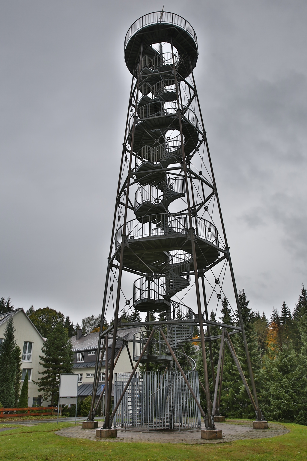 Aussichtsturm auf der Dreibrüderhöhe (688 Meter) bei Marienberg im Erzgebirge.